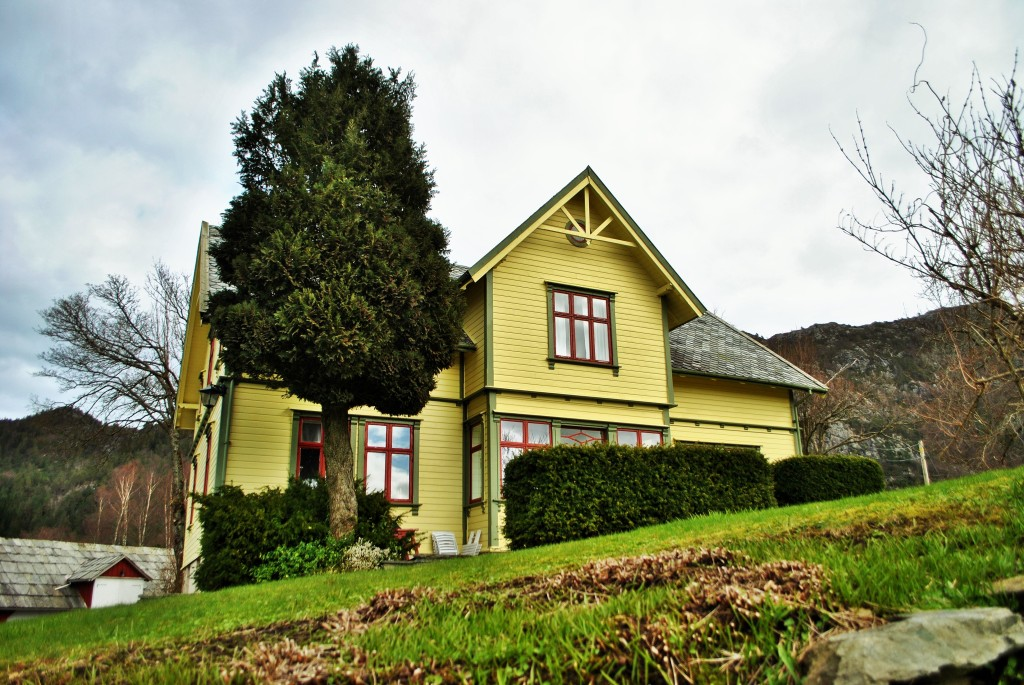 Huset til den avdøde komponisten Fartein Valen i Valevåg. Foto